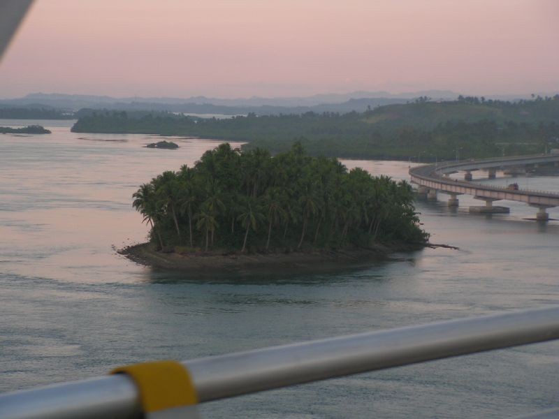 Sanjuanico Bridge, Philippines